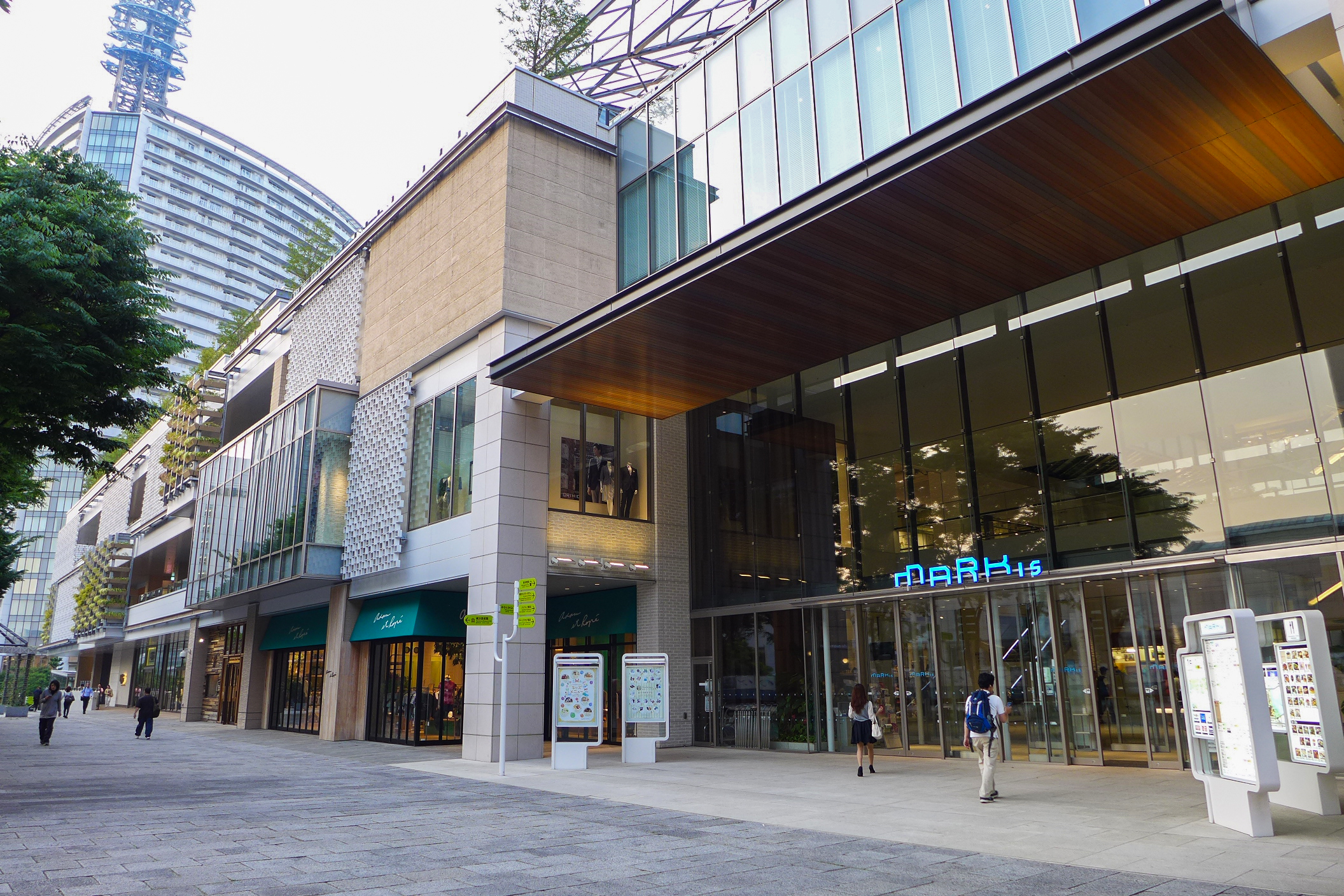 MARK IS minatomirai Entrance